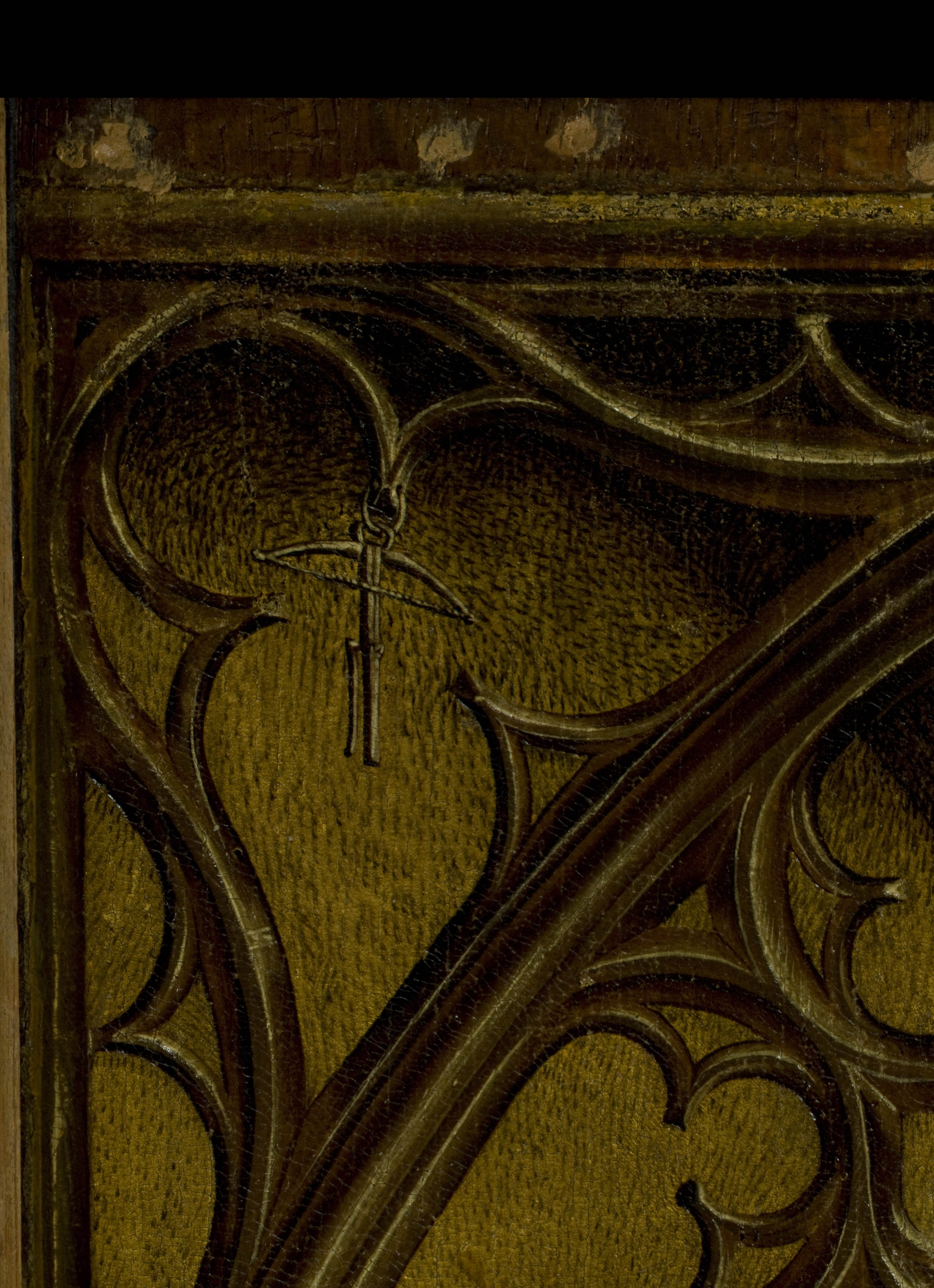 Detail van het maaswerk in het hoofddelvan de Kruisafneming door Rogier van der Weyden; Kruisboog in het maaswerk.